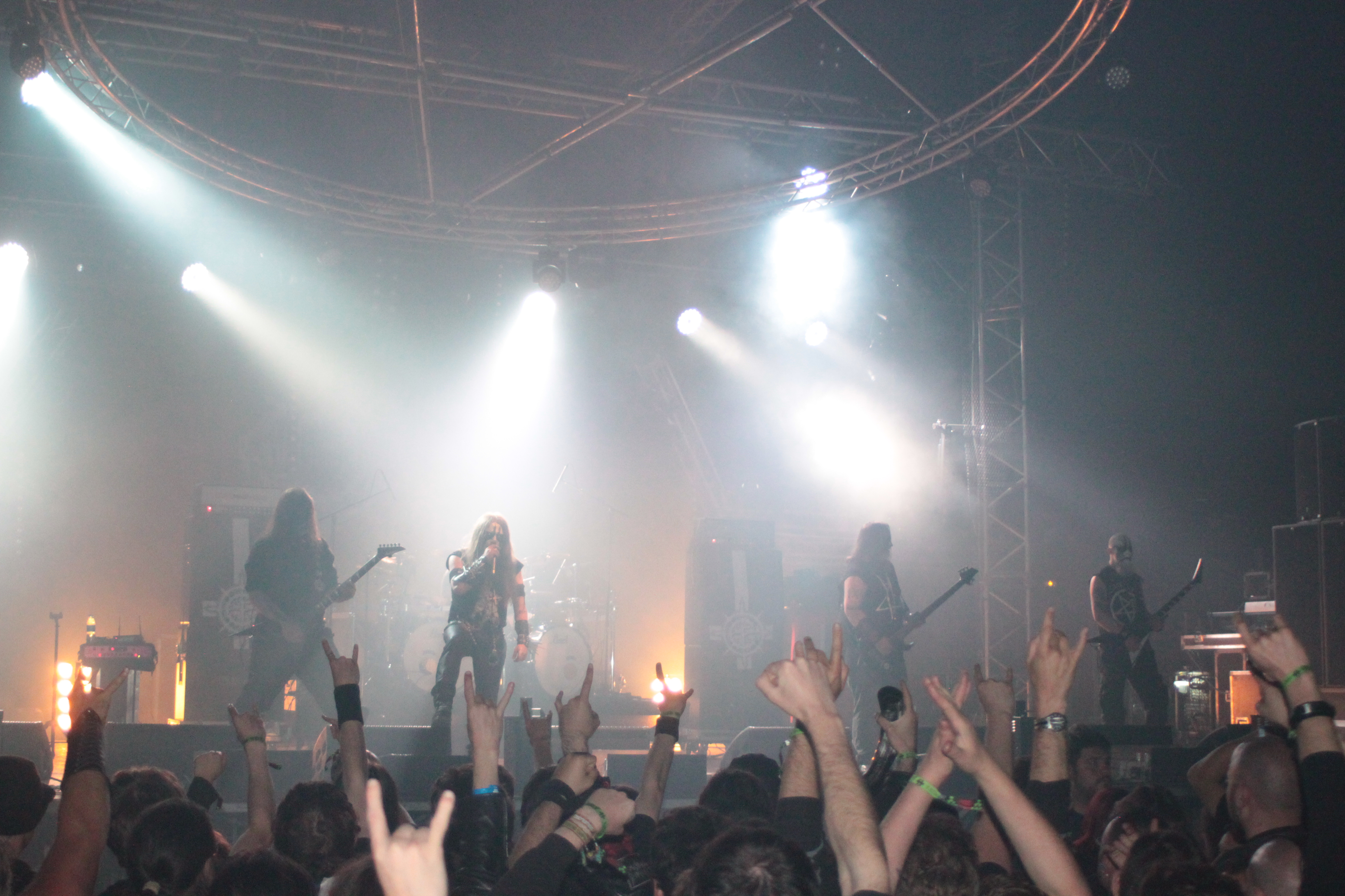 Carpathian Forest, Helfest 2013, Fr-44-Clisson.